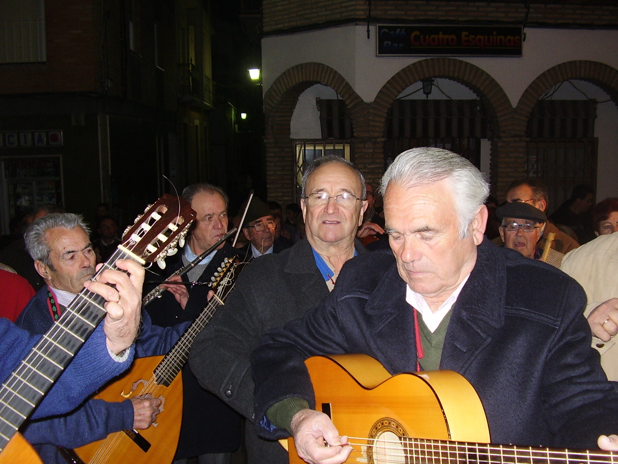 Mochileros interpretando canciones tradicionales de la Nochebuena iznajeña por la Calle Real, 24 de diciembre de 2006